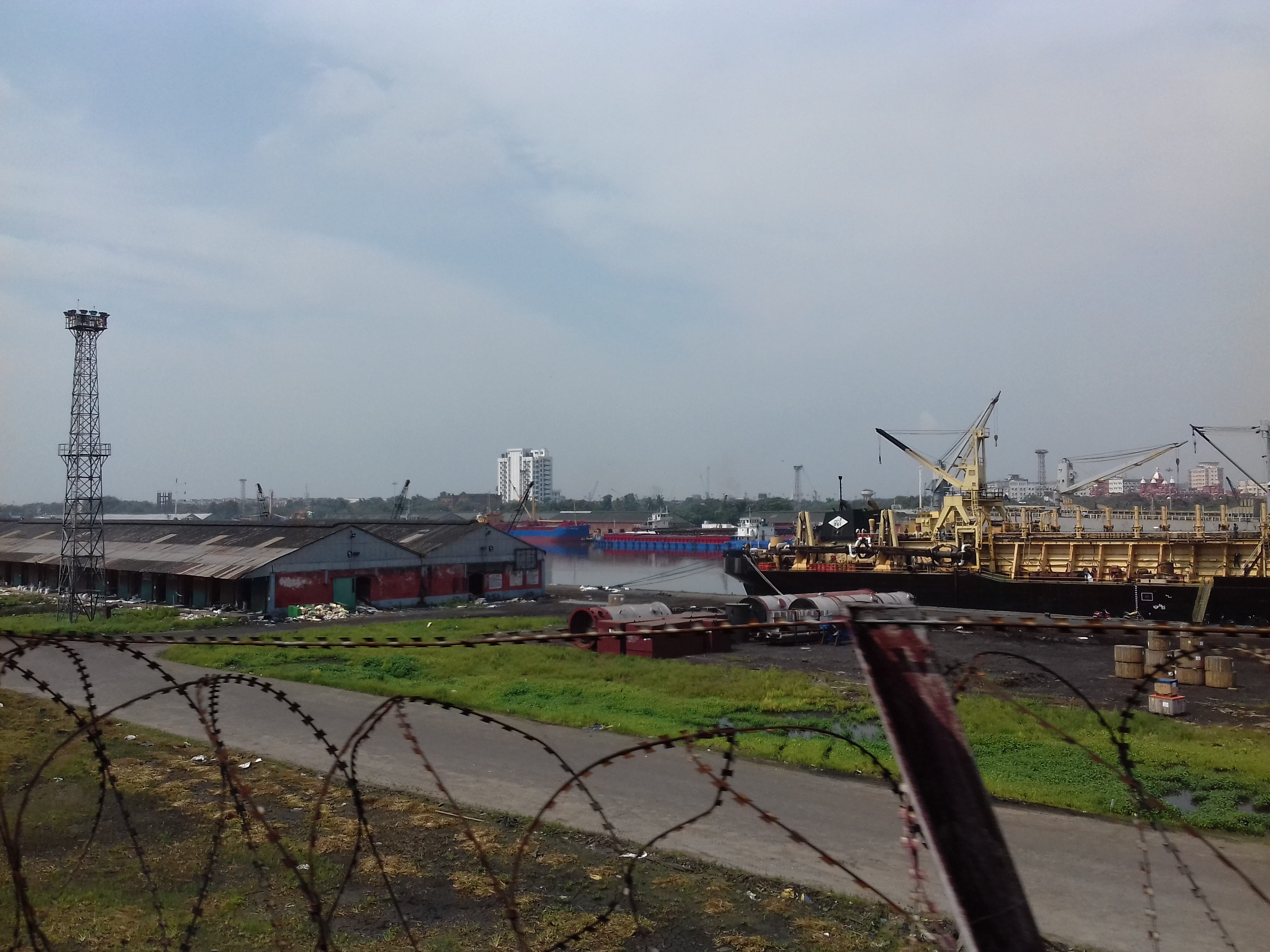 কলকাতা বন্দরের খিদিরপুর ডক।